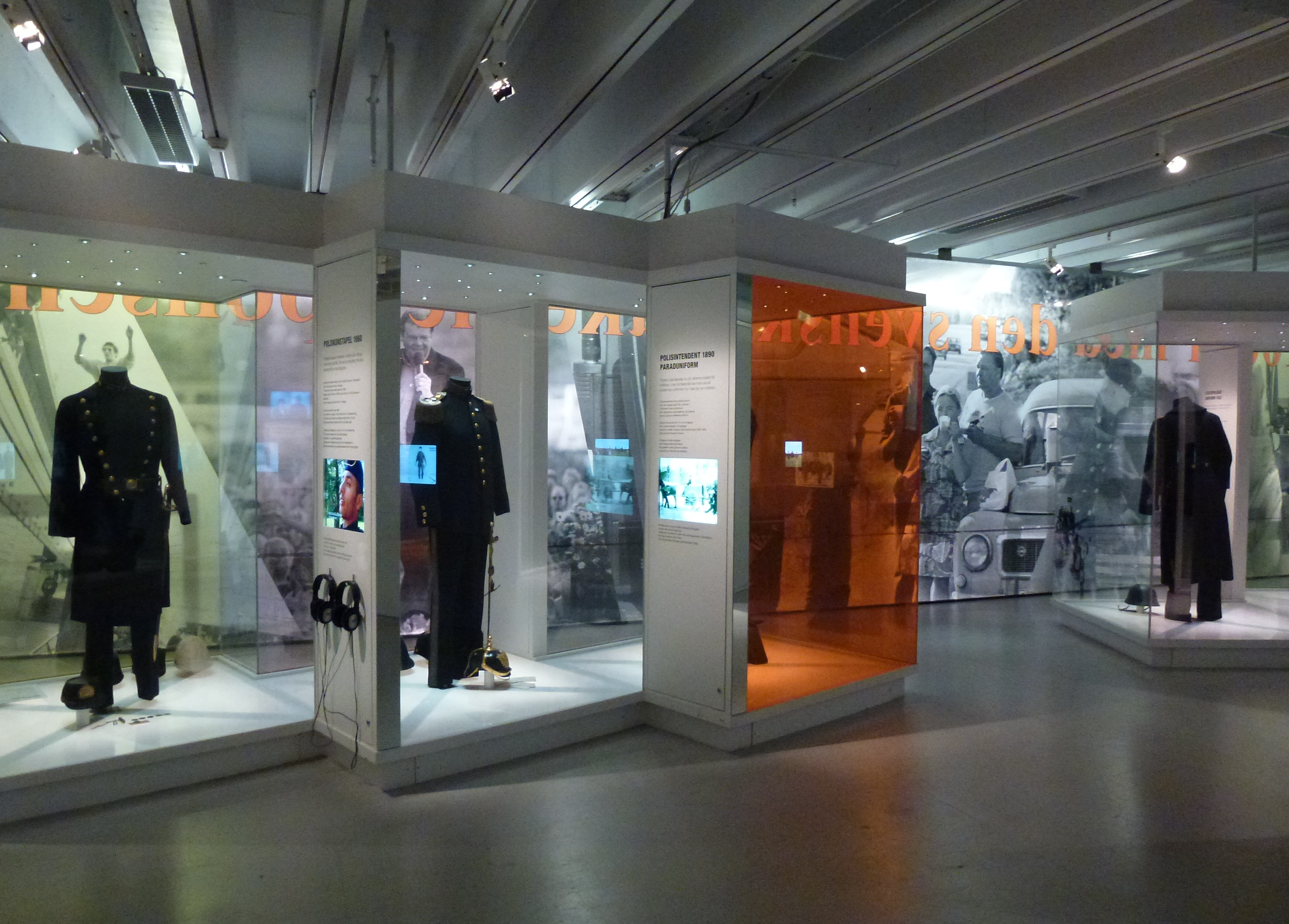 Polismuseet utställningen